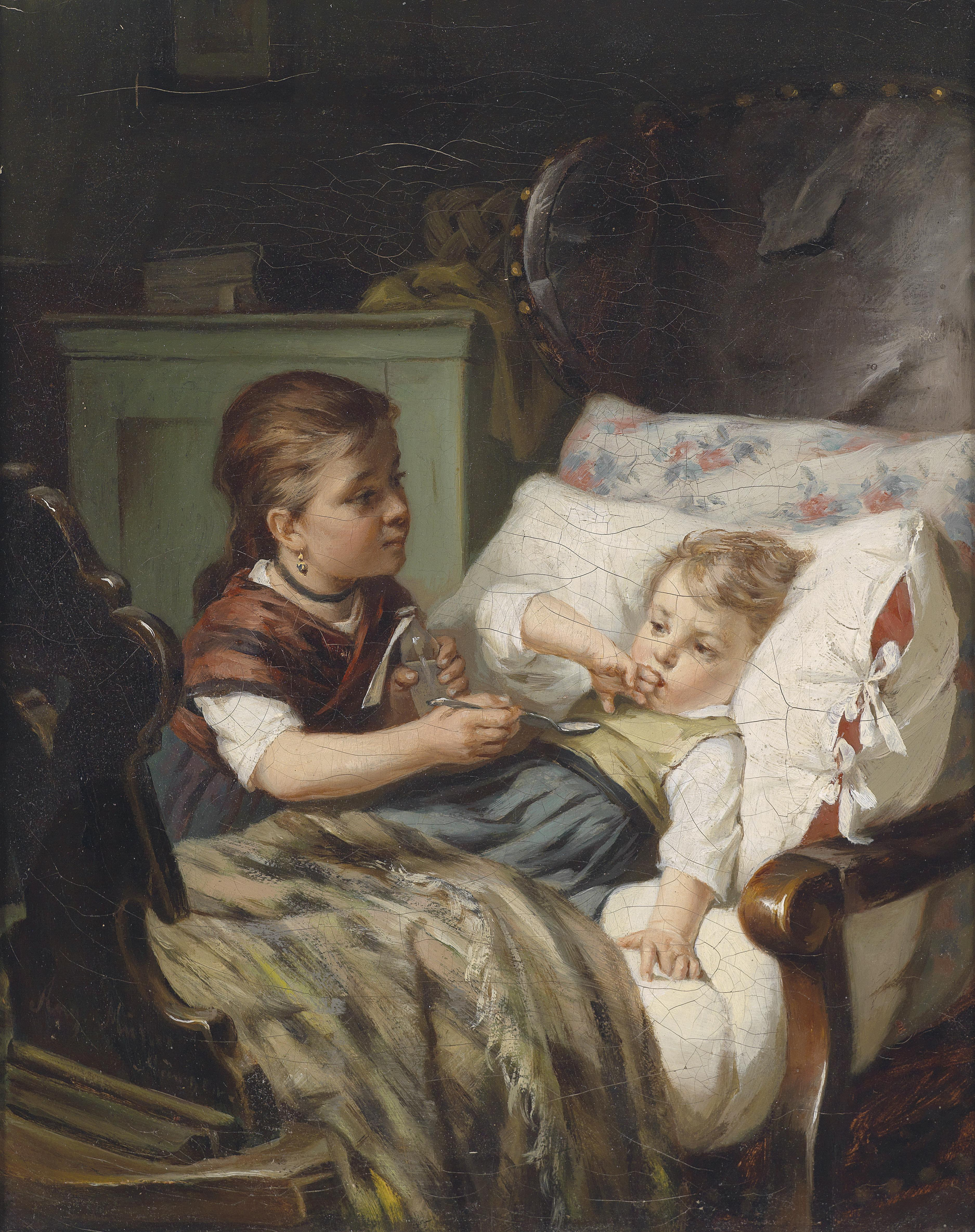 Die Medizin, signiert "Aug. Müller München", Öl auf Leinwand, 28 x 22 cm